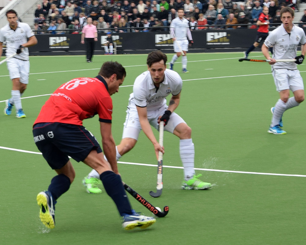 Spielszene KHC Dragons - Racing Brüssel bei EHL 2017 in Eindhoven